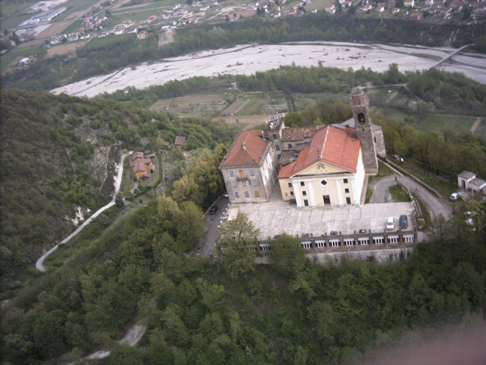 Monte Spineto nel comuen di Stazzano (AL) tra la val Borbera e la valle Scrivia.